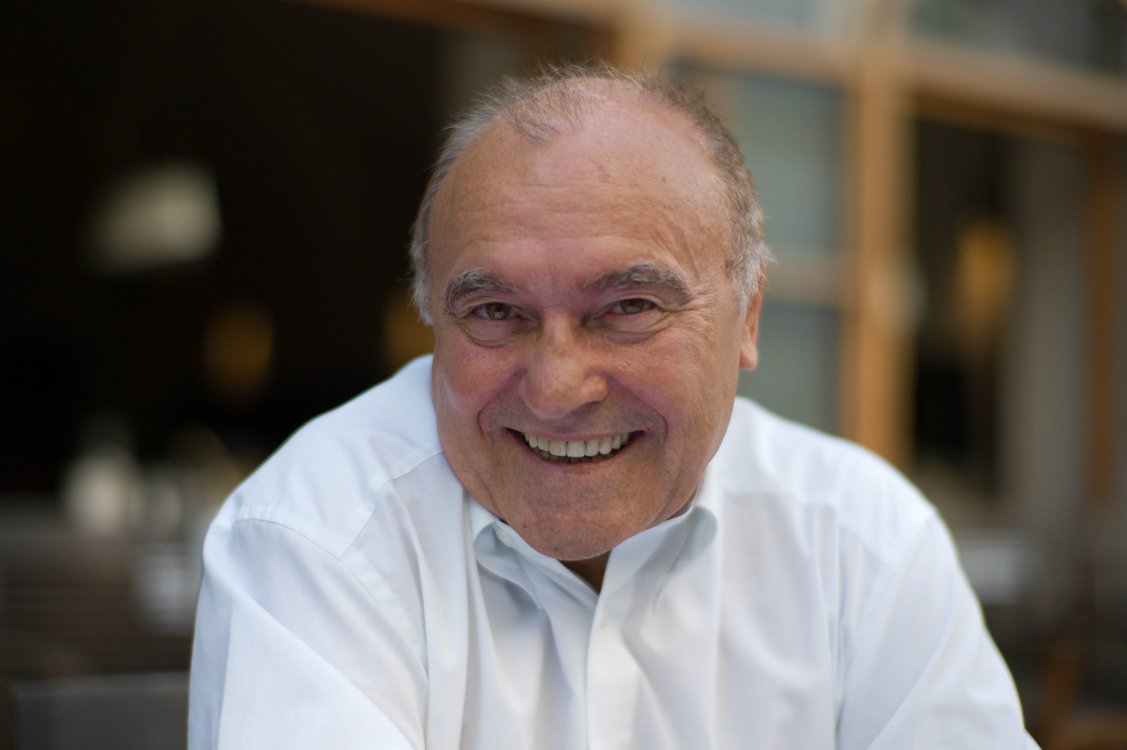 Hannes Leopoldseder, ehemaliger Rundfunk-Journalist und -intendant aus Linz in Oberösterreich in Österreich. Hannes Leopoldseder